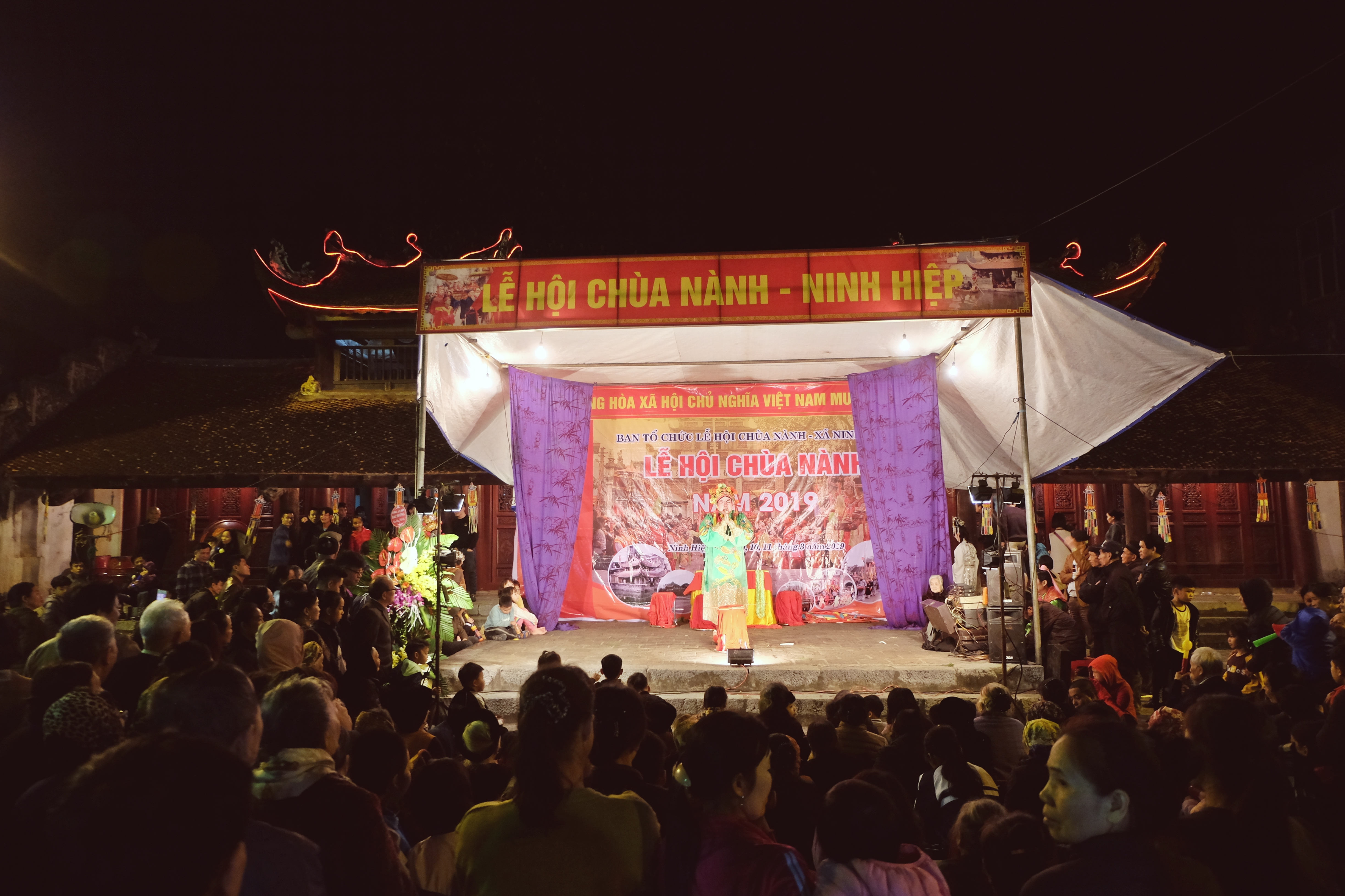 Hát tuồng đêm hội chùa